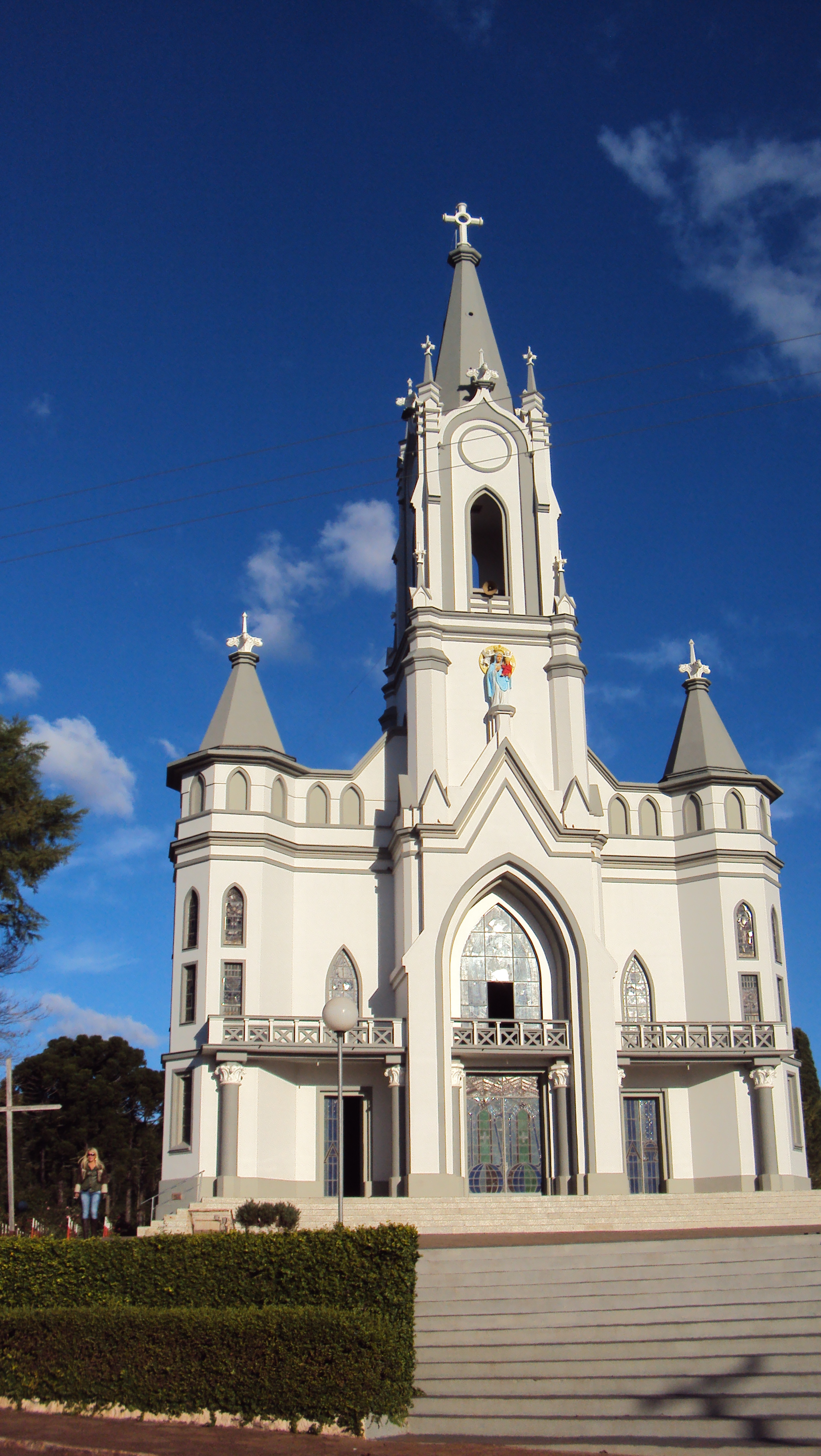 Igreja matriz de Áurea, em 30 de maio de 2013.